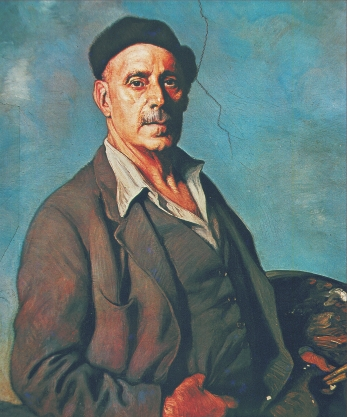 “Arratiarrak”